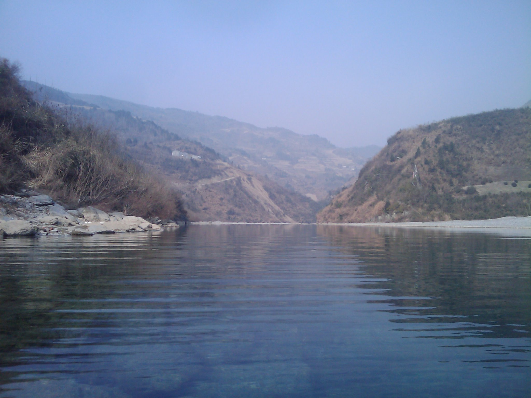 堵河水